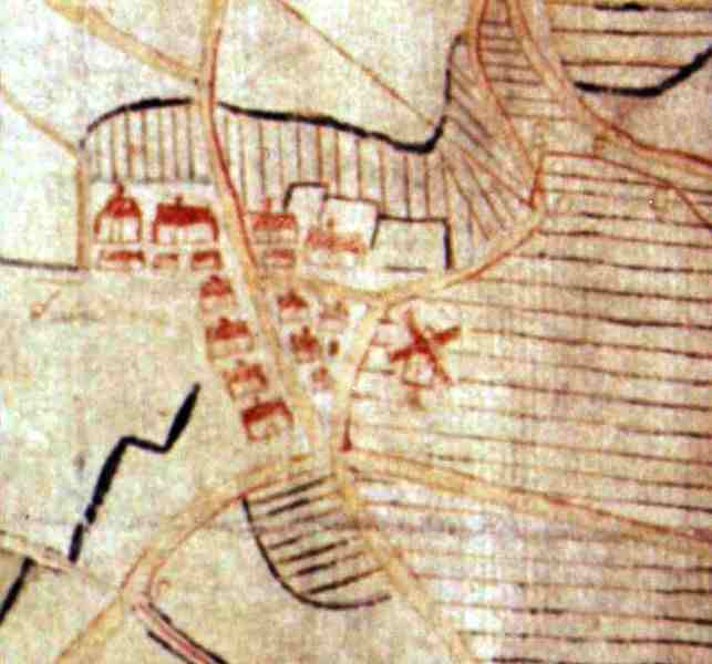 Älteste Darstellung von Fedderingen in Dithmarschen (1780).